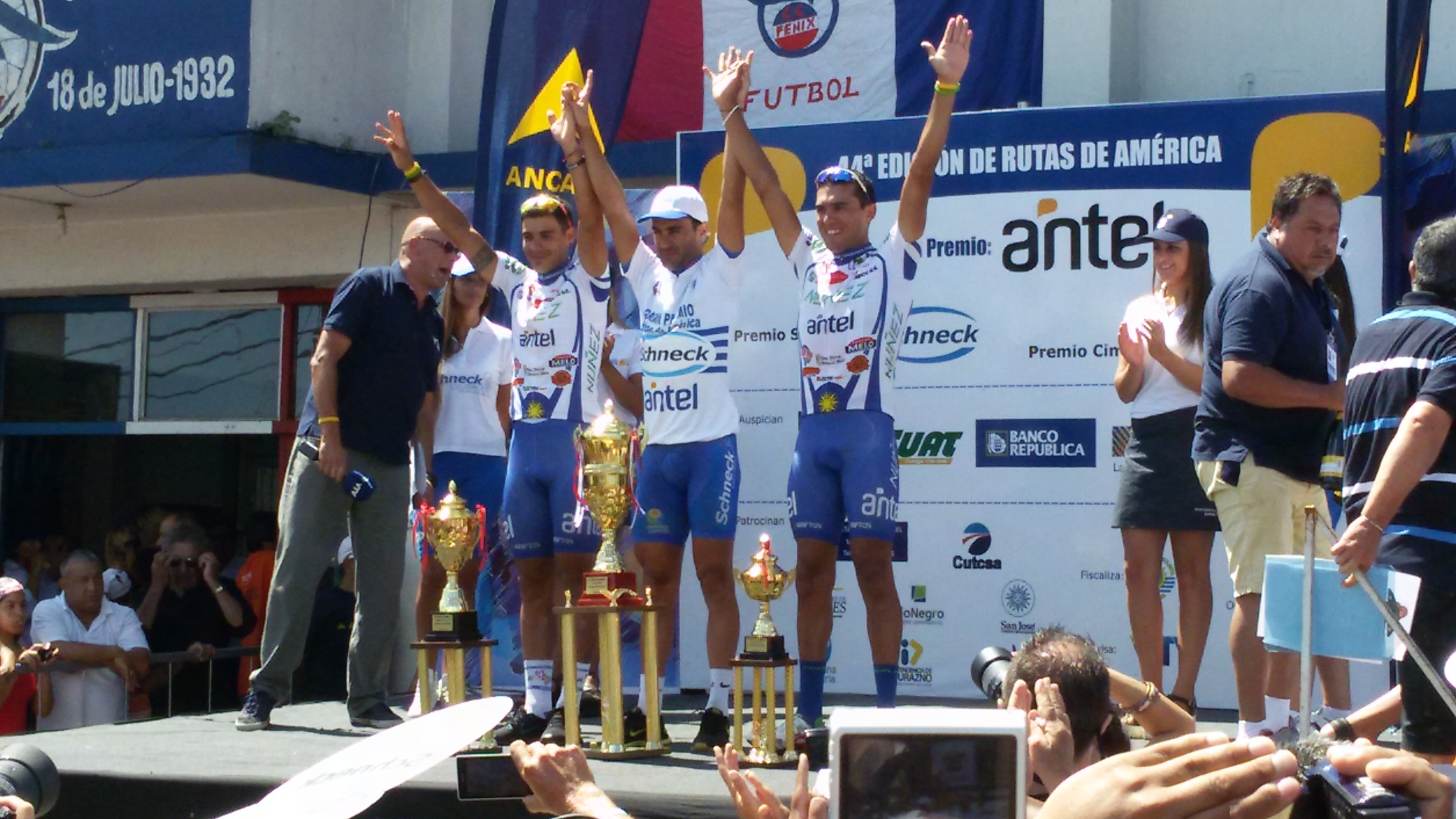 Podio Rutas de américa 2015. Néstor Pías, Alan Presa y Bilker Castro